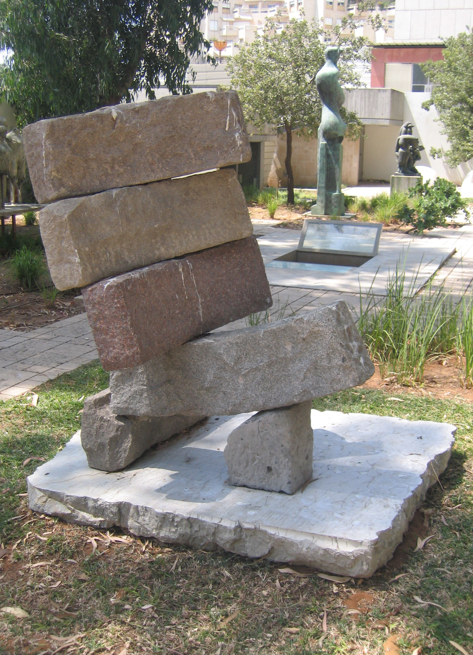 Sculpture